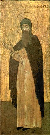 Kornili Pskovski